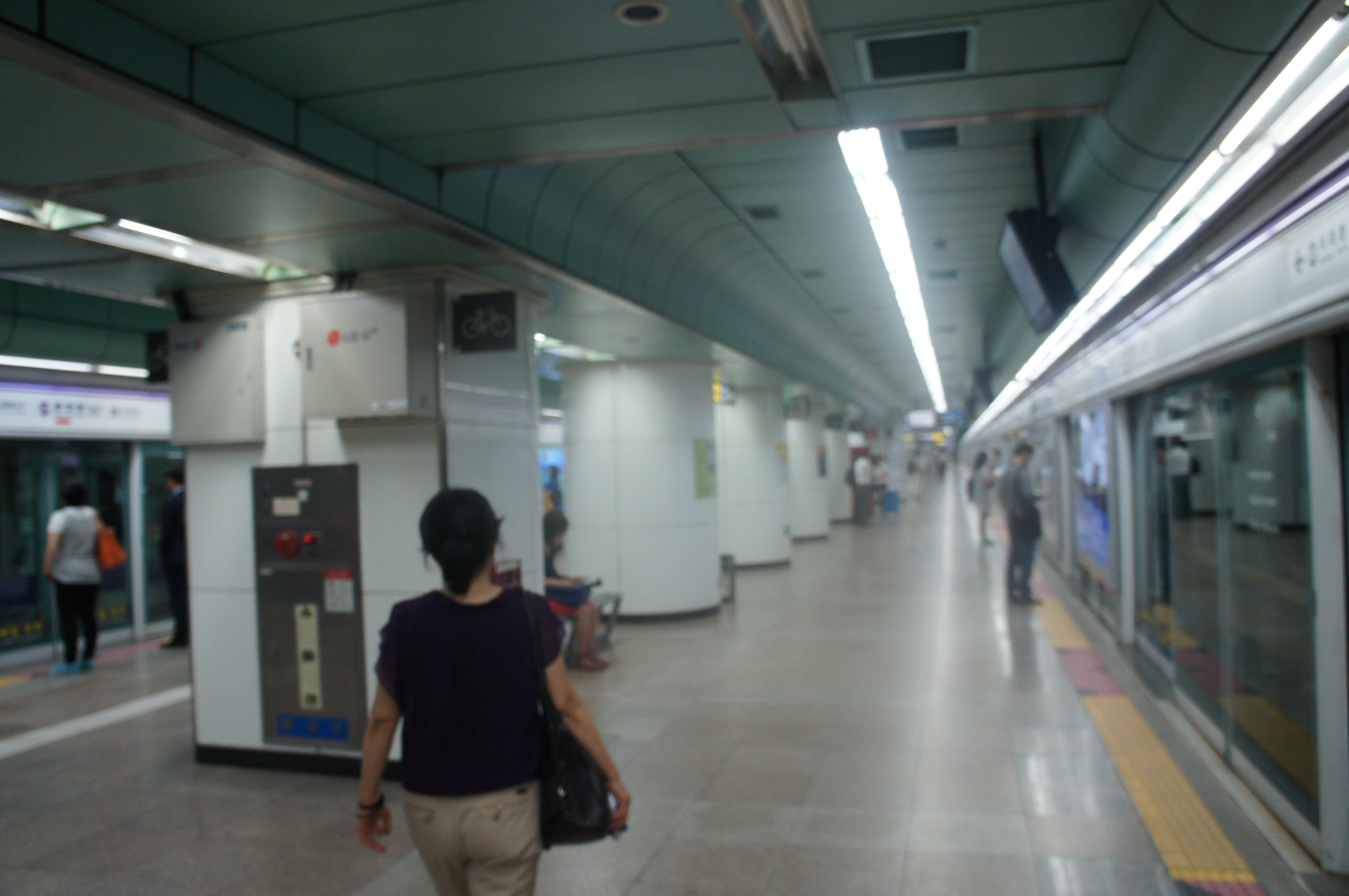 광화문역 승강장